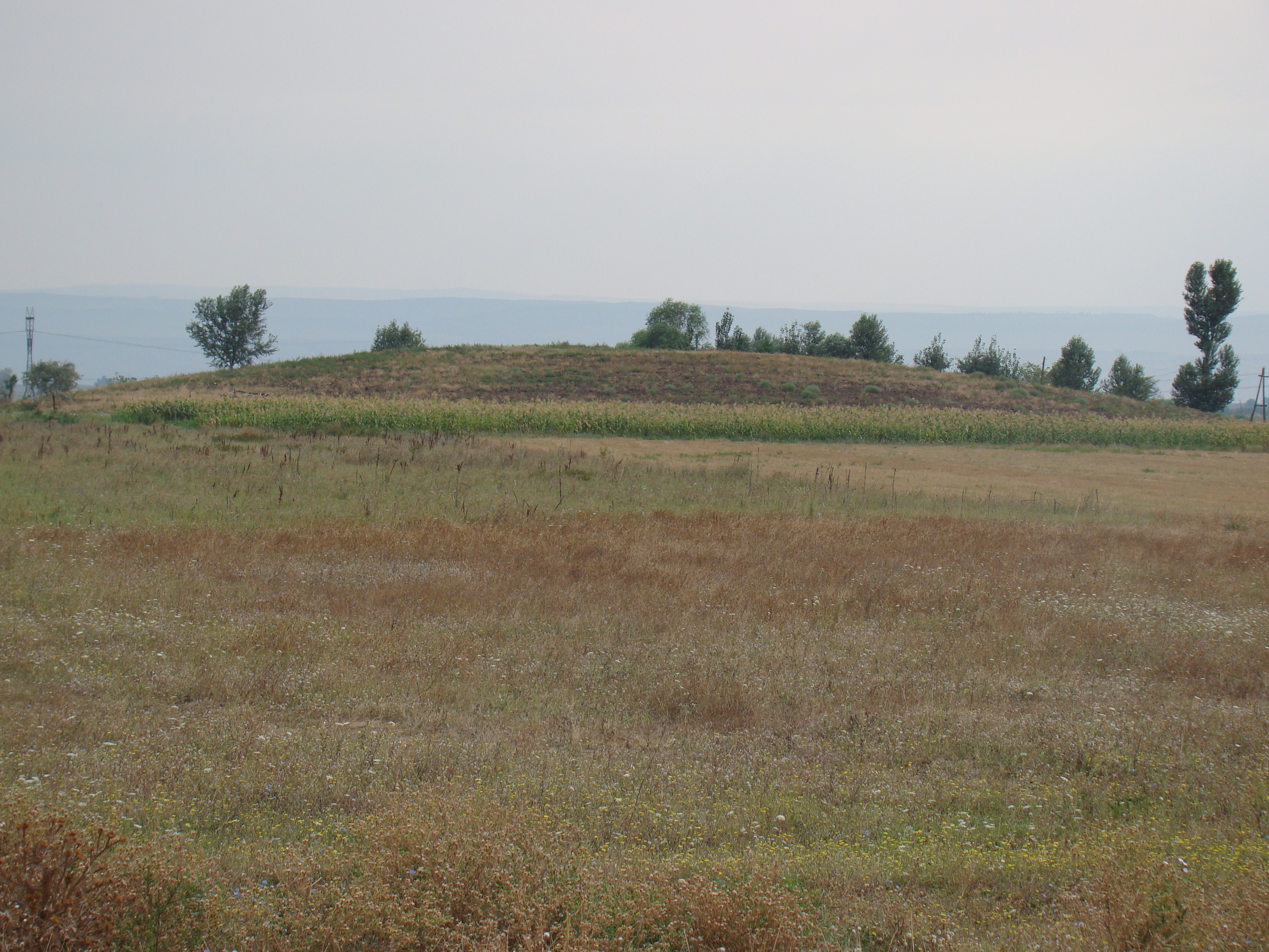 Göytəpə abidəsi ( Əsas Yoldan təpənin şəkili)